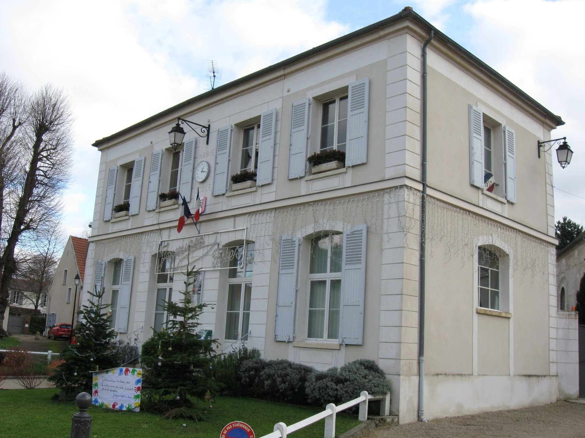 Mairie de Lesches. (Seine-et-Marne, région Île-de-France).